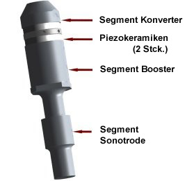 Schaubild eines Schweißsystems mit Konverter, Booster und Sonotrode